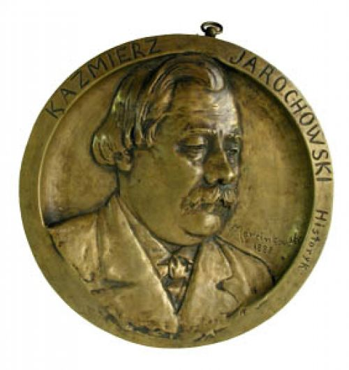 Музей: Нацыянальны мастацкі музей Рэспублікі Беларусь Тып: выяўленчыя крыніцы Від: скульптура Прадметнае імя: медаль Назва/аўтарская назва: Партрэт Казіміра Ярахоўскага Аўтары: Марцынкоўскі Уладзіслаў (Marcinkowski); Матэрыялы: бронза; Тэхналогіі стварэння: ліццё; чаканка; манціроўка; пацініраванне; Дата стварэння: 1888 г. Месца стварэння: Польшча Памеры: дм.20 см